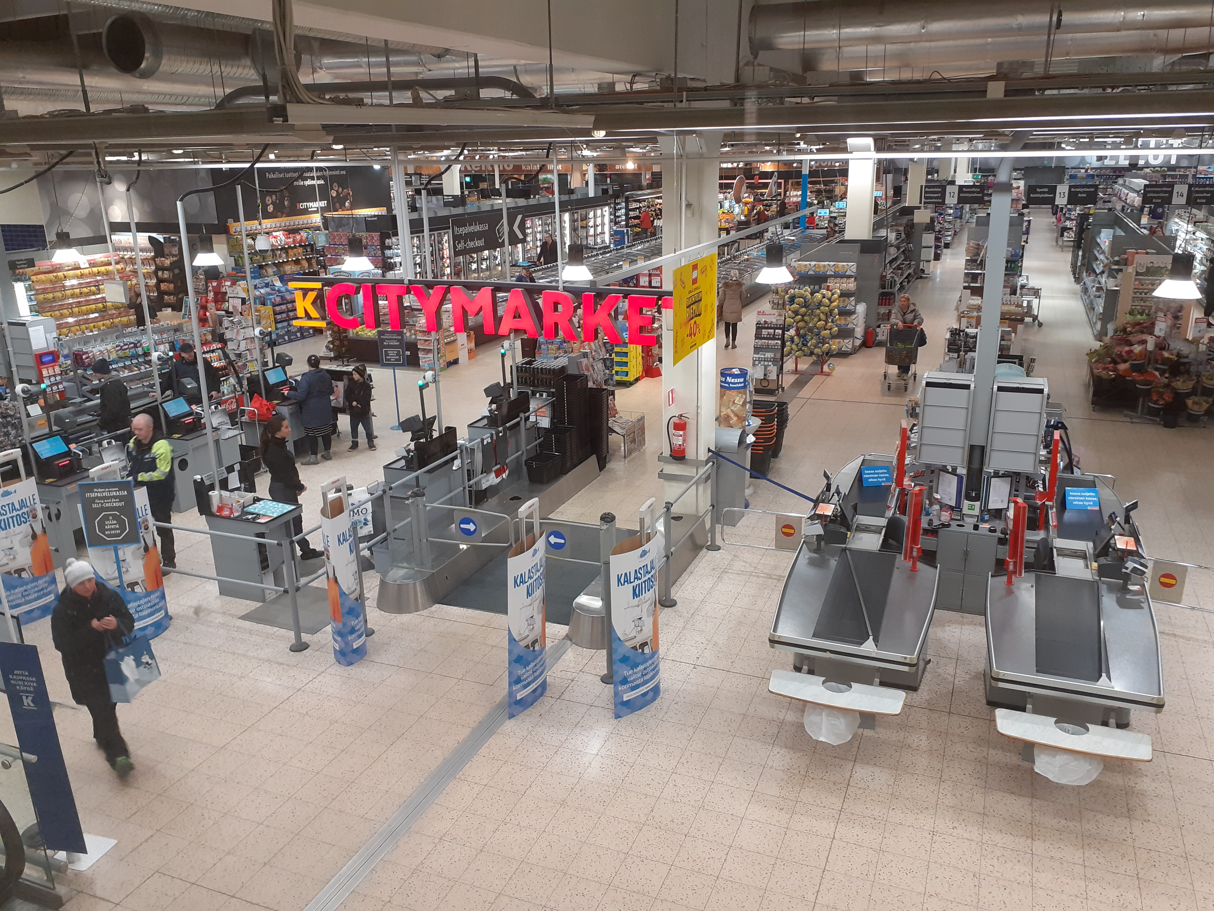 K-Citymarket in Viiri shopping centre, Klaukkala